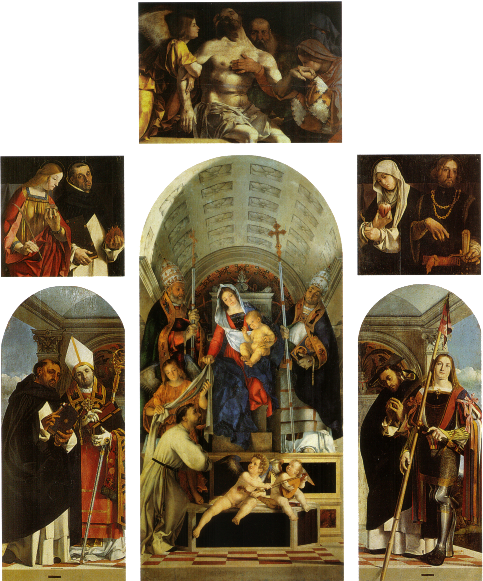 Recanati Altarpiece